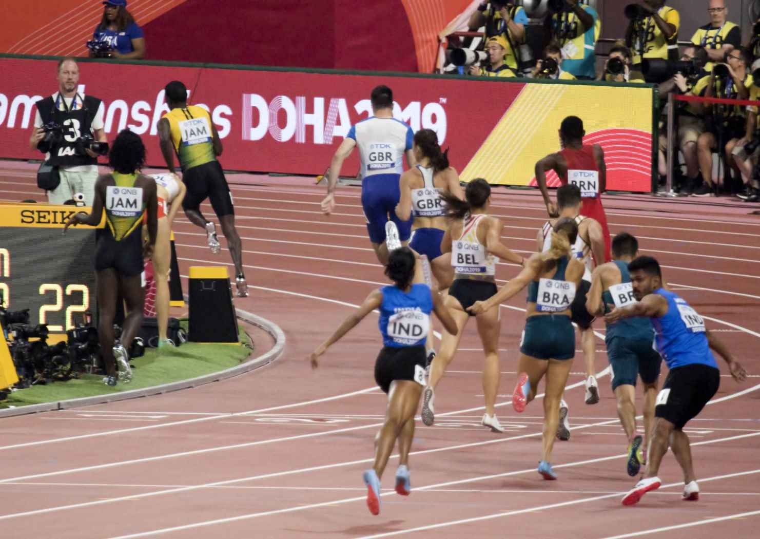 DOH301604x400 mix final